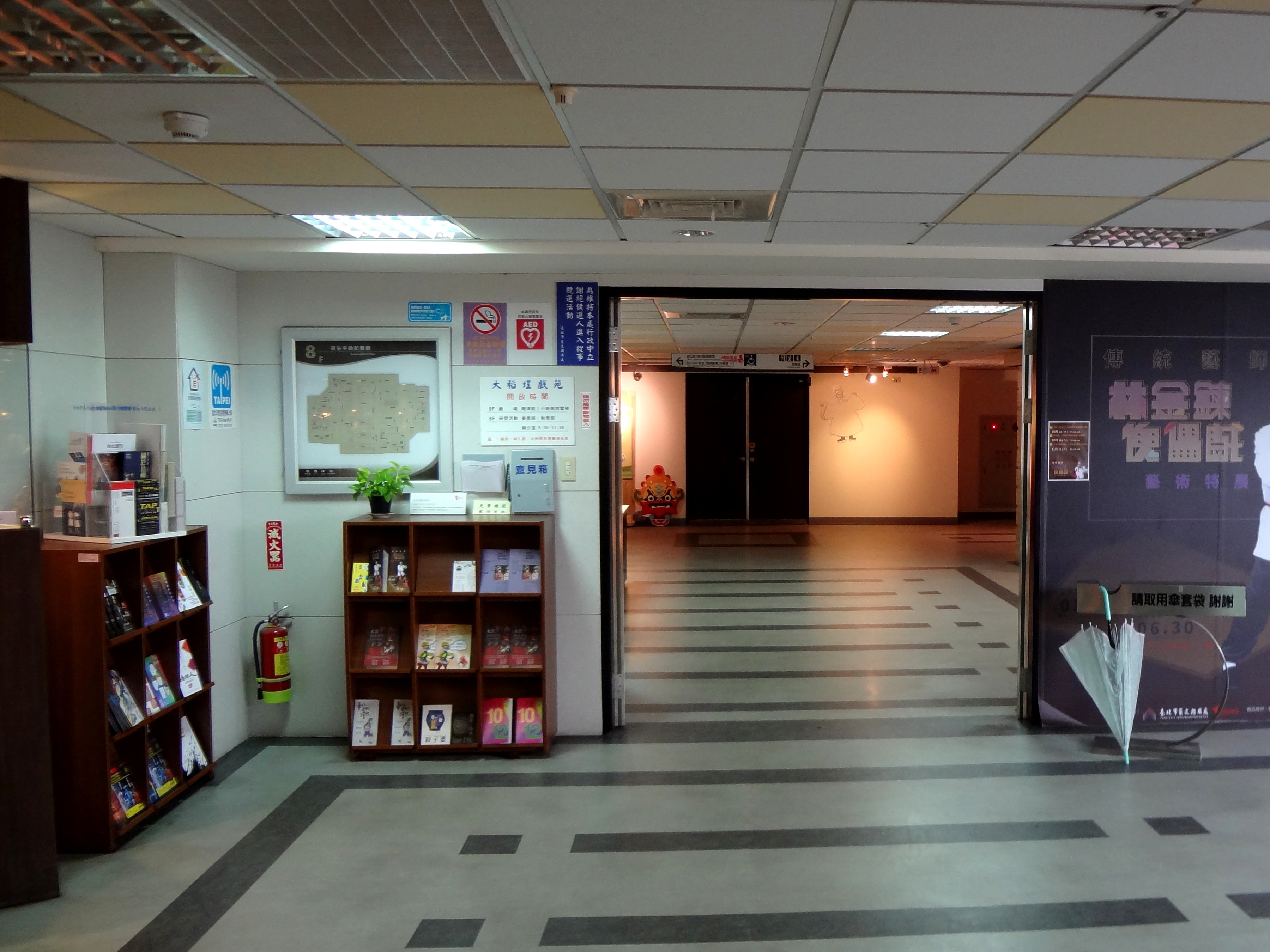 臺北市藝文推廣處大稻埕戲苑大門，位於臺北市永樂大樓8樓。